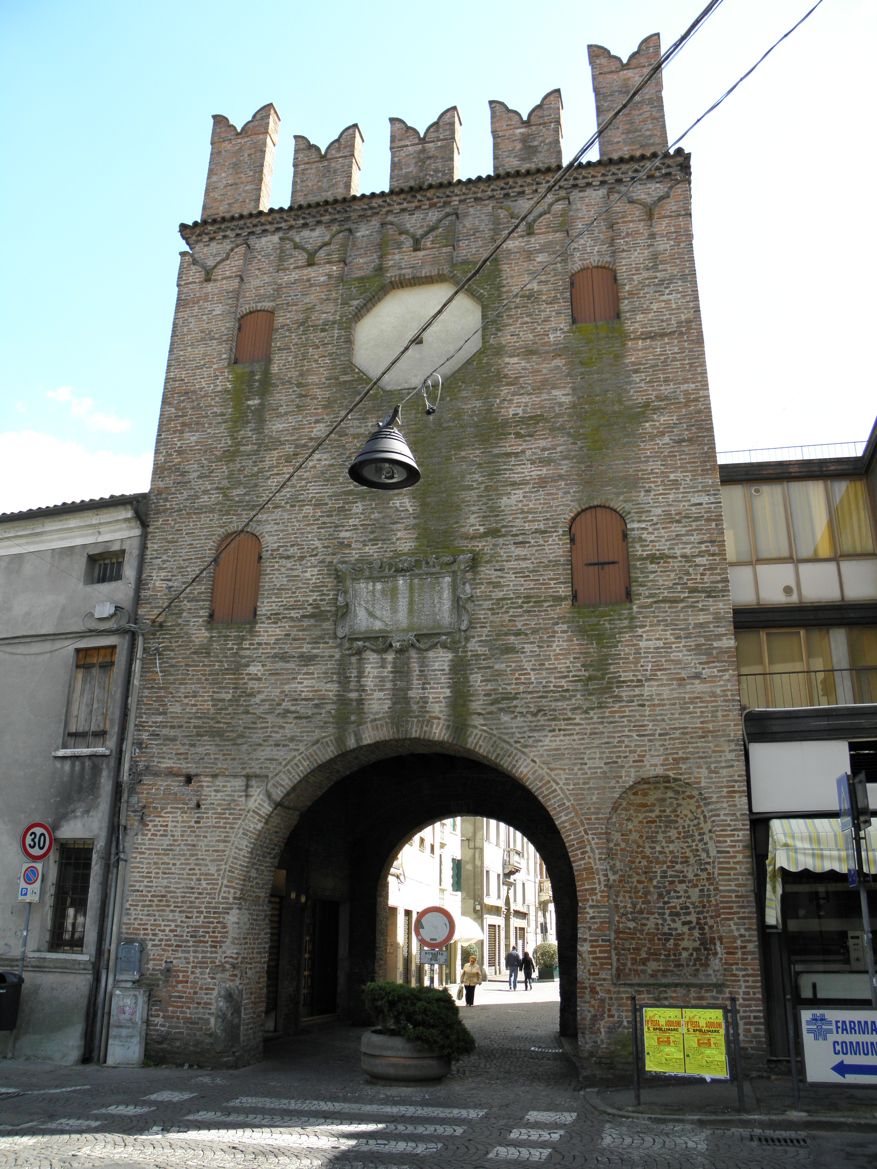 Rovigo, Porta San Bortolo: la porta merlata vista dallo spiazzo verso il centro cittadino.